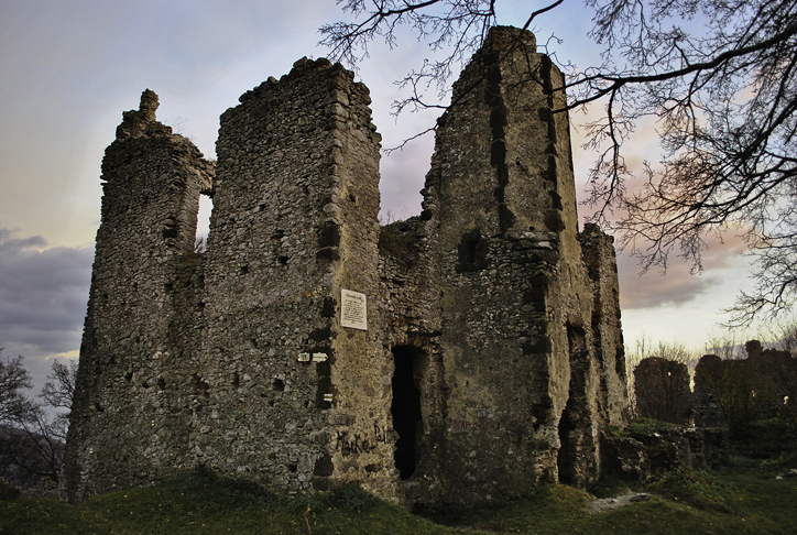 nádvorie hradu